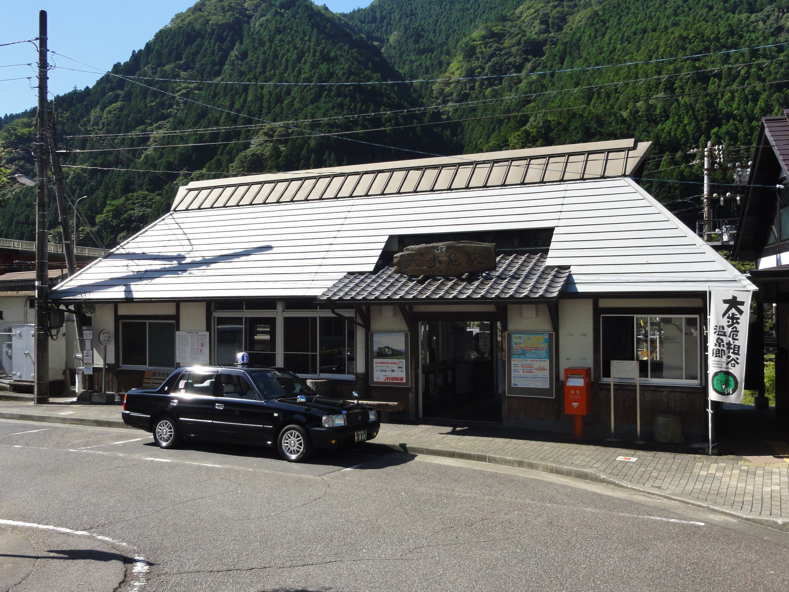 大歩危駅